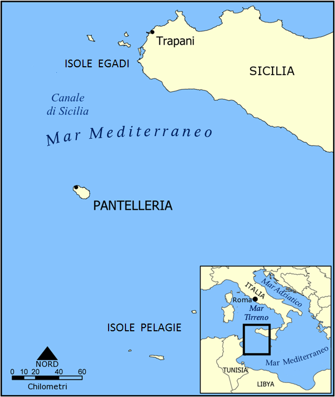 Ricavata da Pantelleria blank map.png